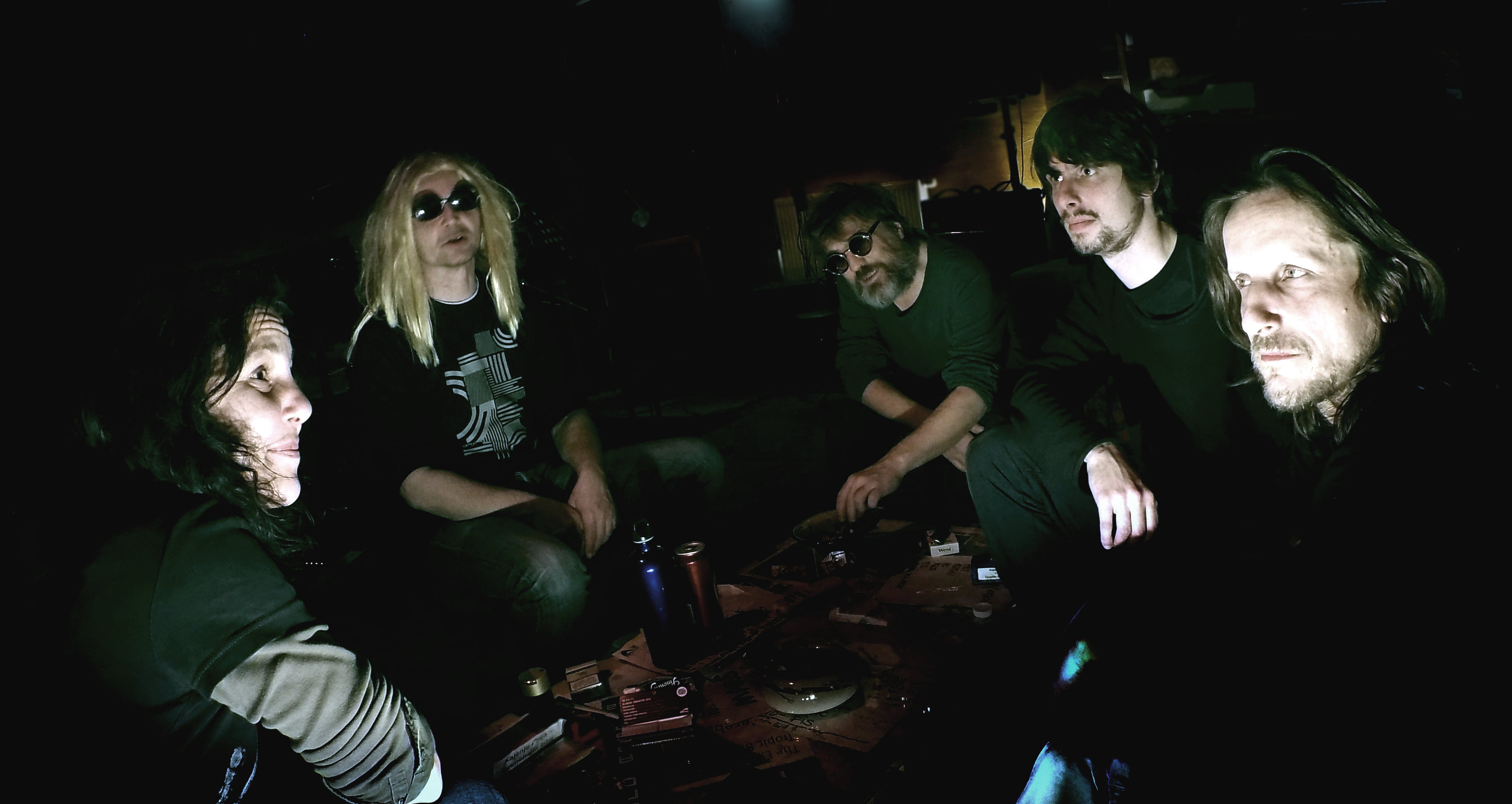 Zasedba NeSeBat